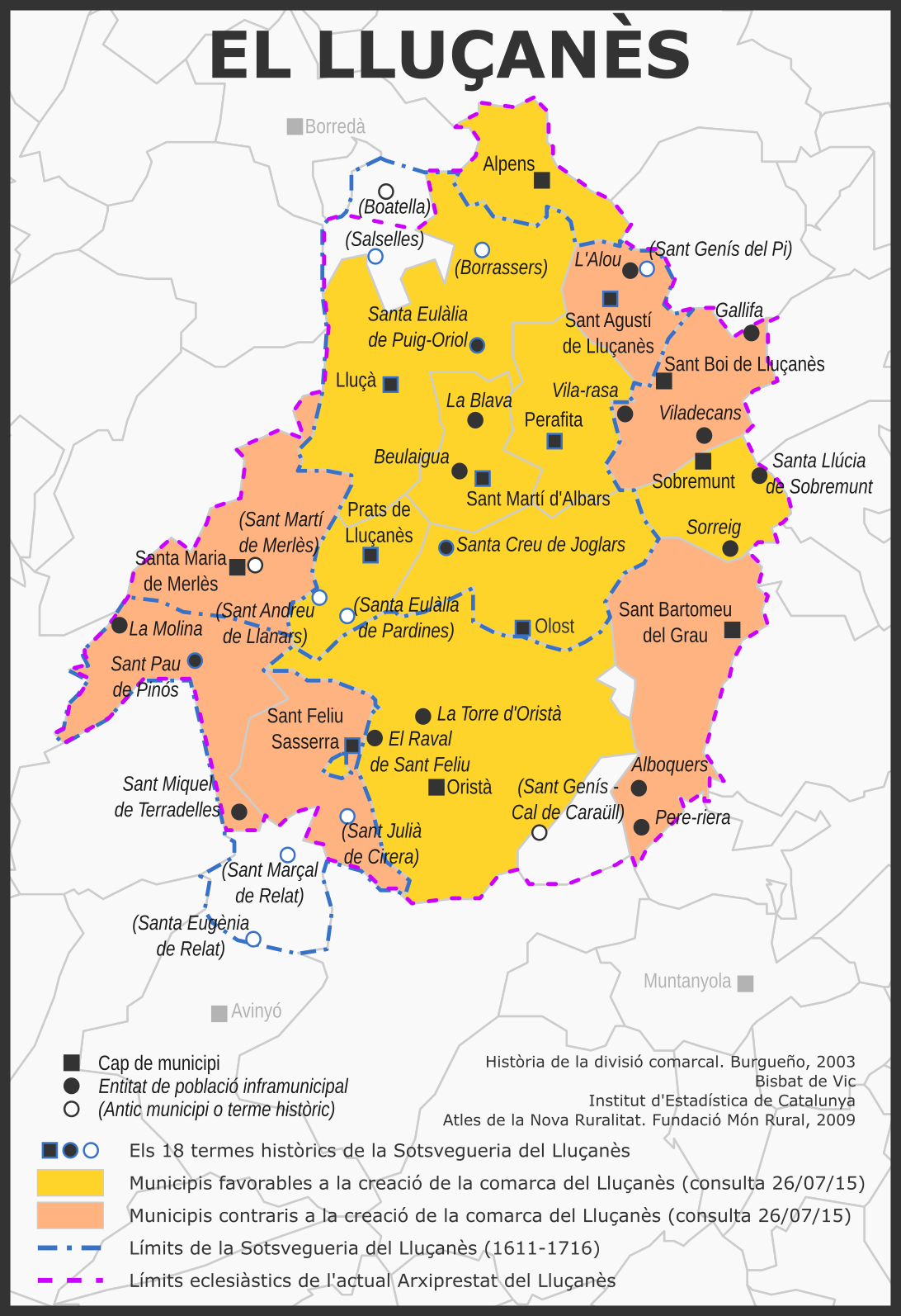 Plànol dels municipis del Lluçanès, mostrant els resultats de la consulta per municipi, així com altres entitats territorials actuals o extintes, els límits històrics de la Sotsvegueria del Lluçanès, i els límits actuals de l'Arxiprestat del Lluçanès.